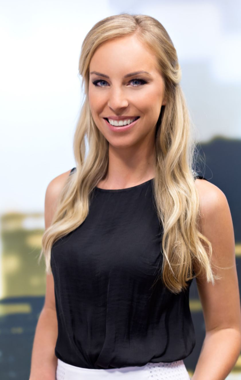 Nadine Friedrich Profil Fernsehmoderation